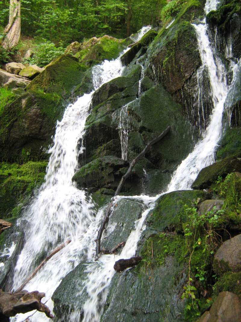 Wasserfall im Døndalen, Bornholm, DK